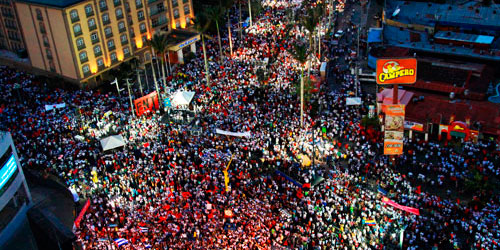 La Interseccion en la Celebracion del Dia de los Trabajadores